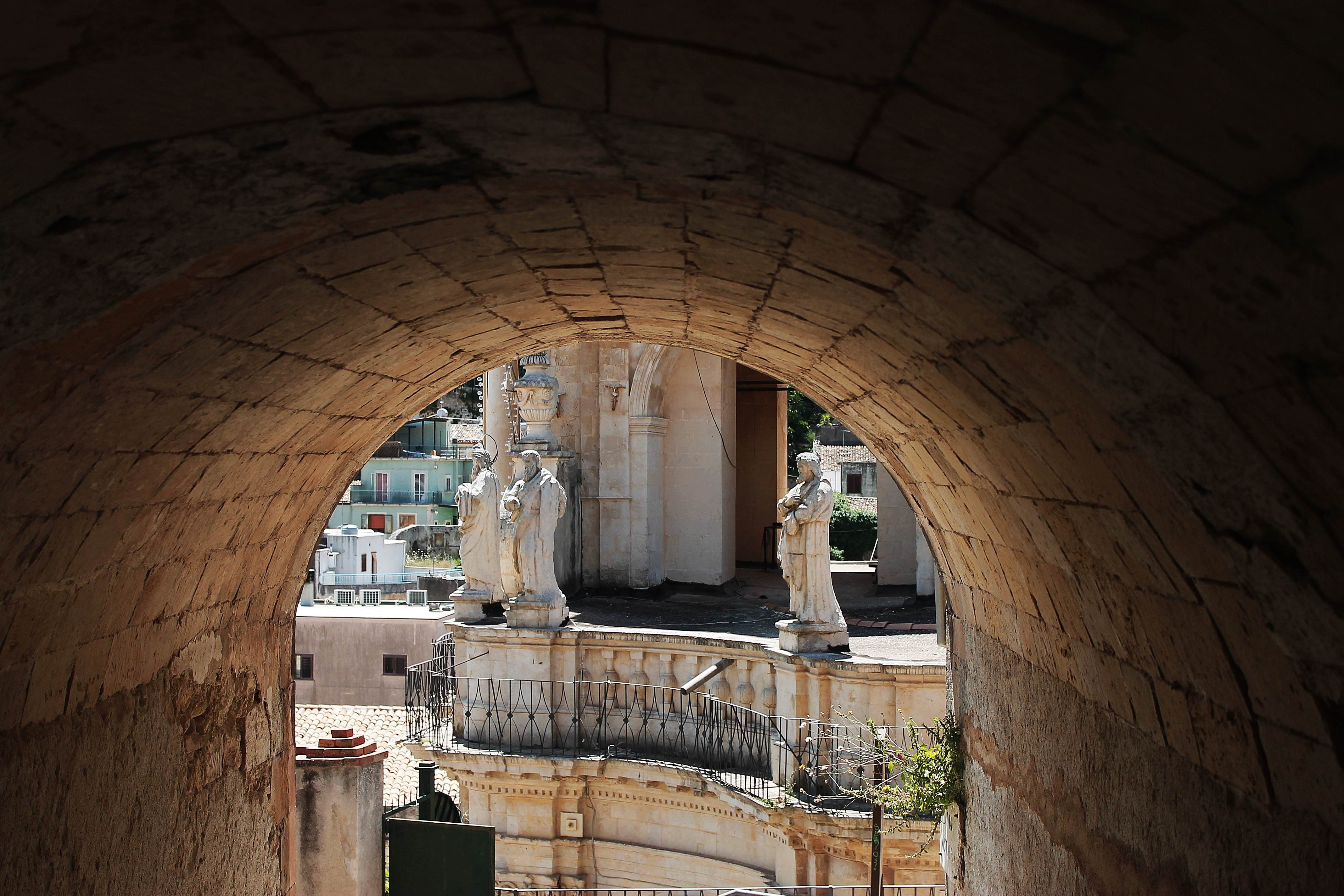 quartiere medievale di Palazzolo Acreide This is a photo of a monument which is part of cultural heritage of Italy.